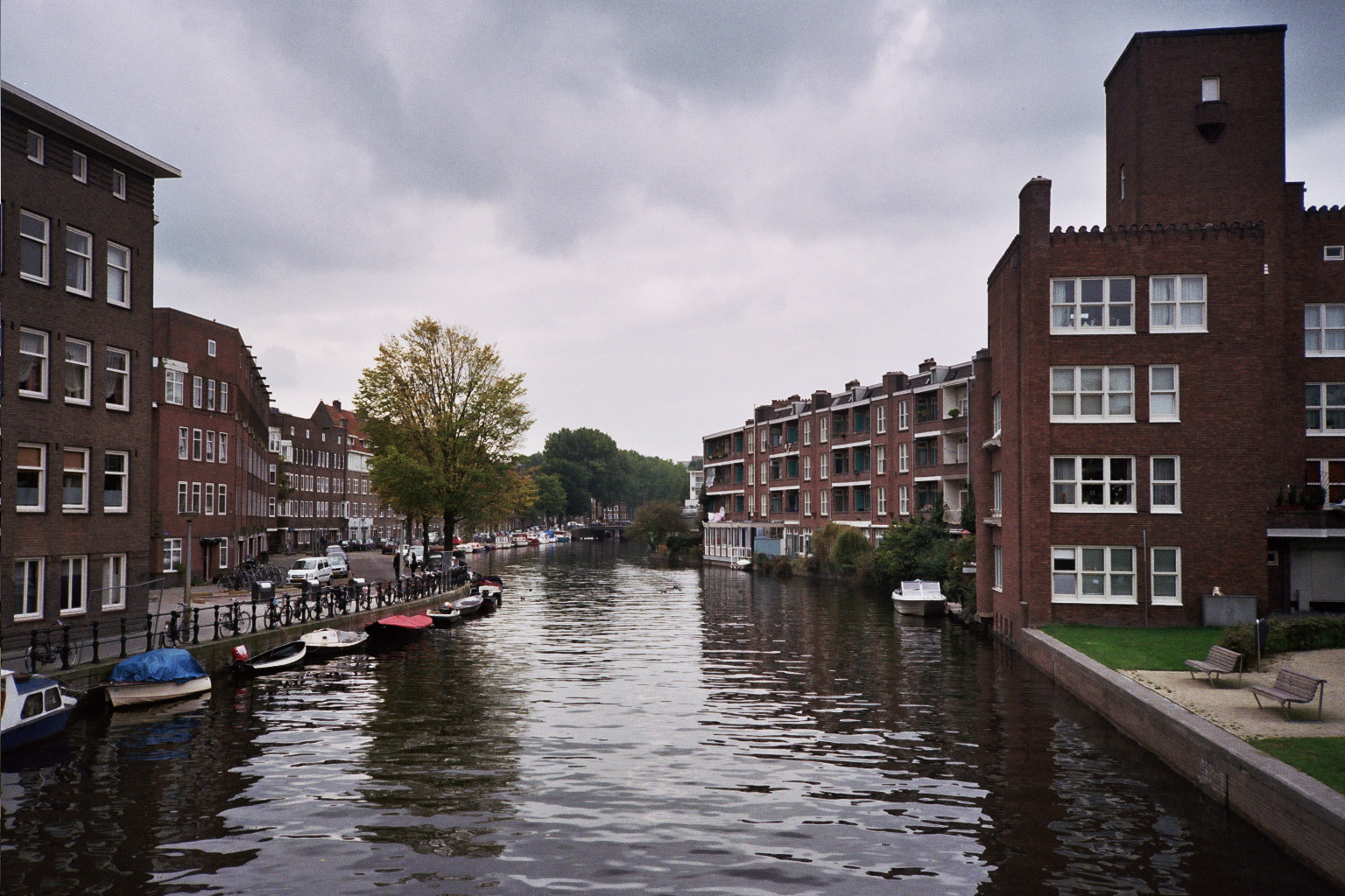 Postjeswetering, Amsterdam met in de verte nauwelijks zichtbaar brug 231